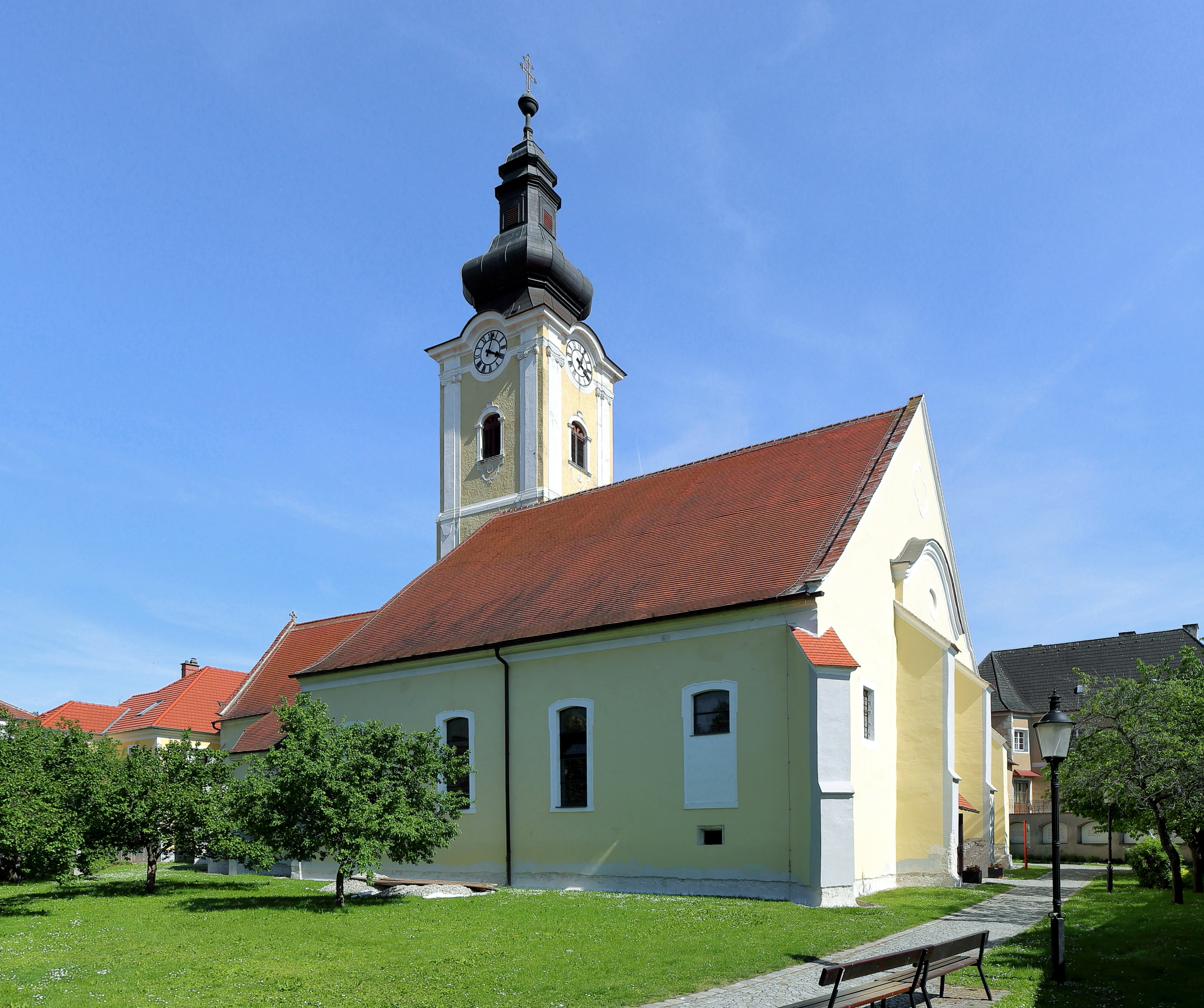 Nordwestansicht der römisch-katholischen Pfarrkirche hl. Stefan in der niederösterreichischen Stadt Mautern an der Donau.Die Kirche wurde in der zweiten Hälfte des 14. Jahrhunderts errichtet, wobei die nördliche Chorseitenkapelle (Totenkapelle) älteren Bestandes ist (Ende 14. Jahrhundert). In den Jahren 1695/96 baute Carlo Antonio Carlone das Langhaus innen um und barockisierte es. Der mächtige, dreigeschossige Kirchturm im südlichen Chorwinkel wurde über mittelalterlichen Kern von 1774 bis 1777 von dem Baumeister Karl Ehmann errichtet.